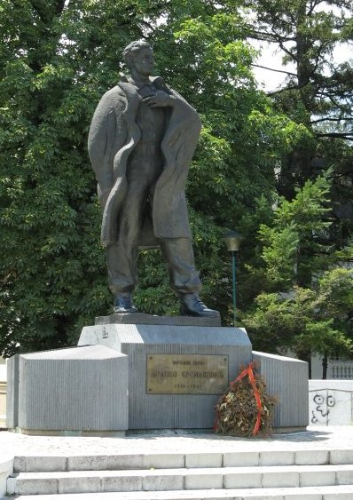 Památník Branka Krsmanoviće v Paraćinu, Srbsko